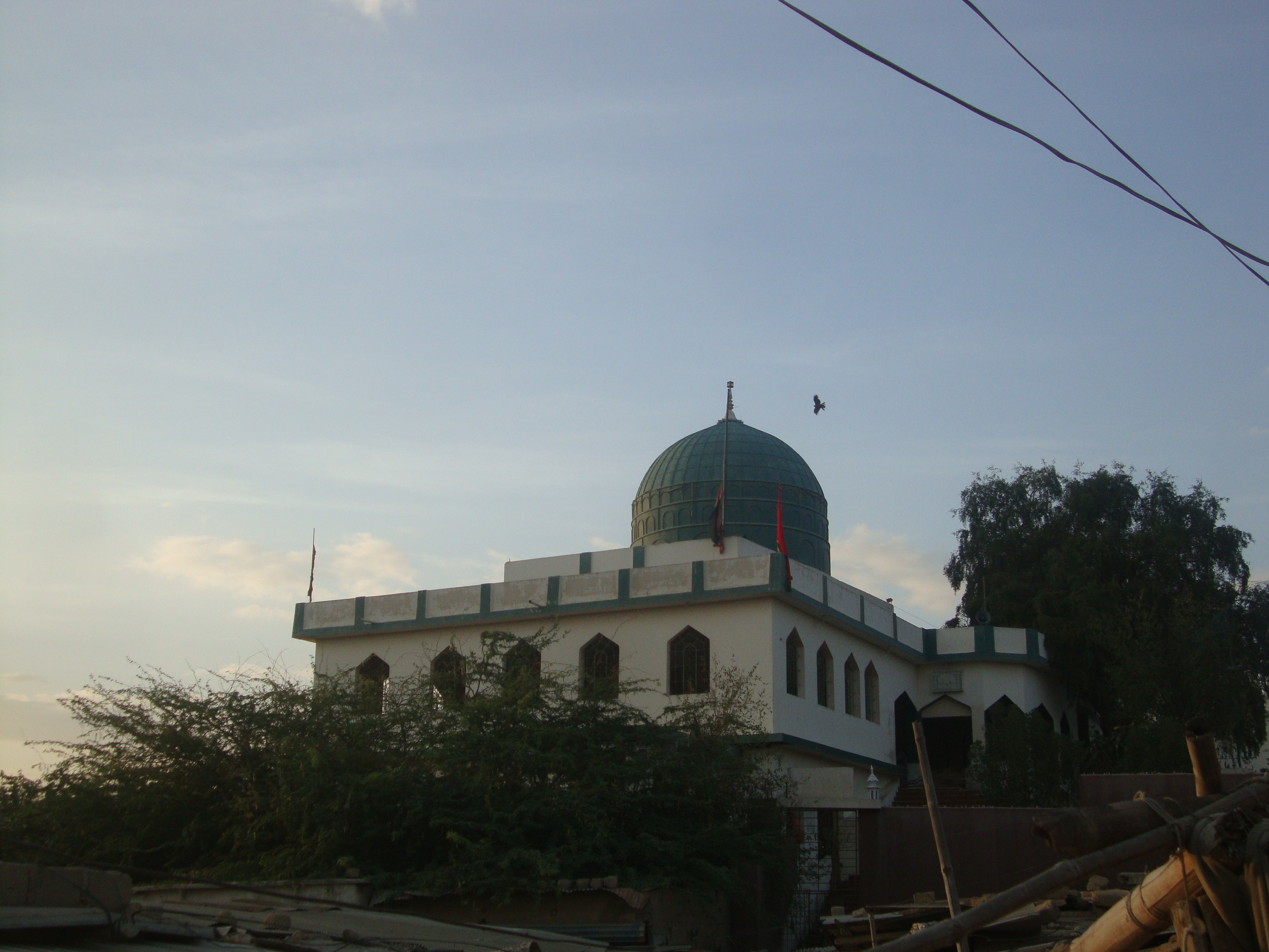 Manghopir Mazar of Shaikh Sakhi Sultan Shah Baba